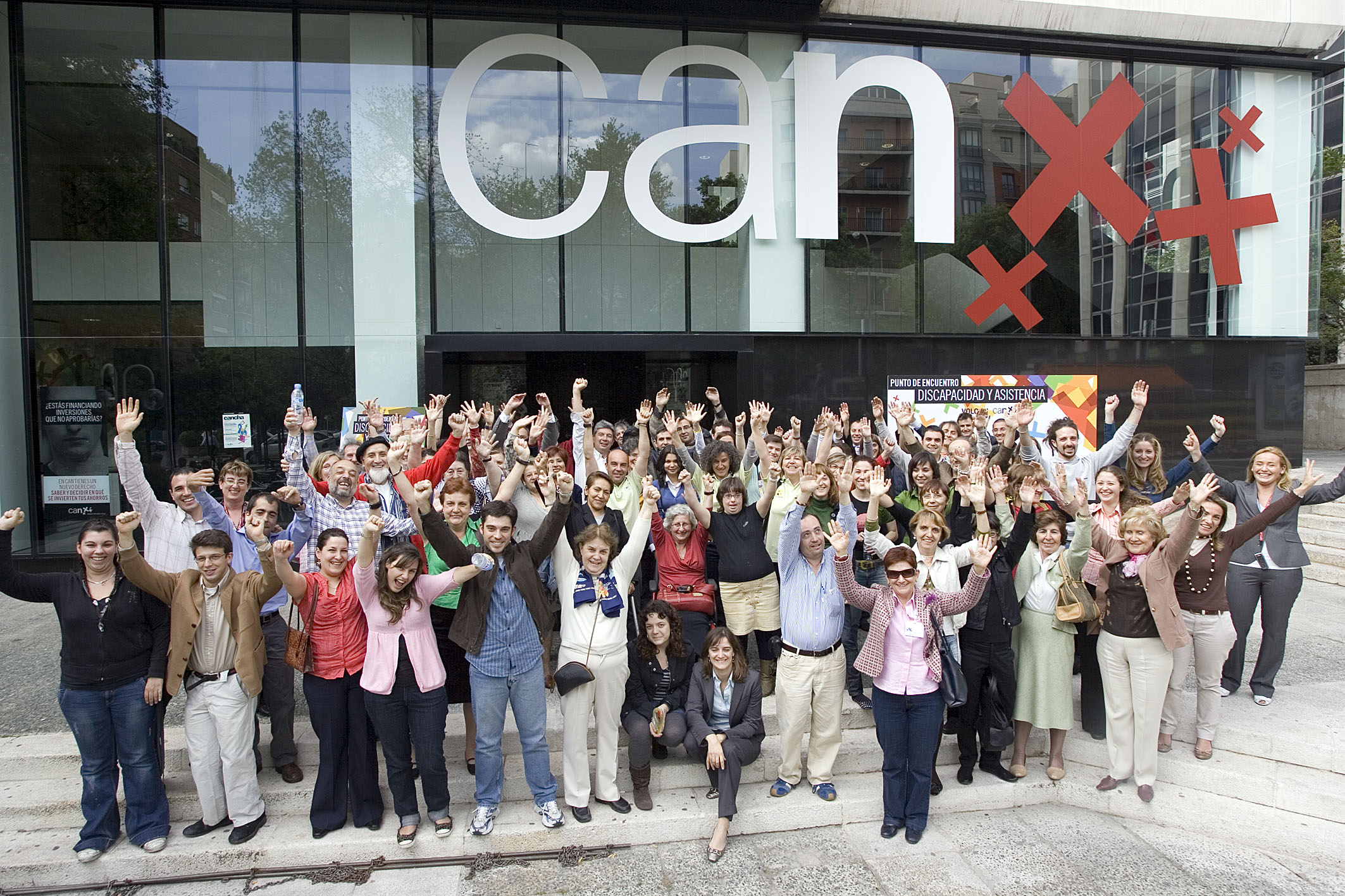 Punto de Encuentro de voluntariado relacionado con la discapacidad celebrado en Madrid.